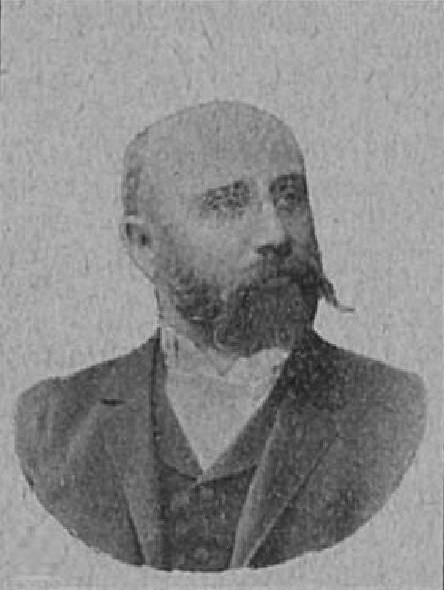 Josef Stancl (1851-1924), rakouský politik české národnosti z Moravy; poslanec Moravského zemského sněmu